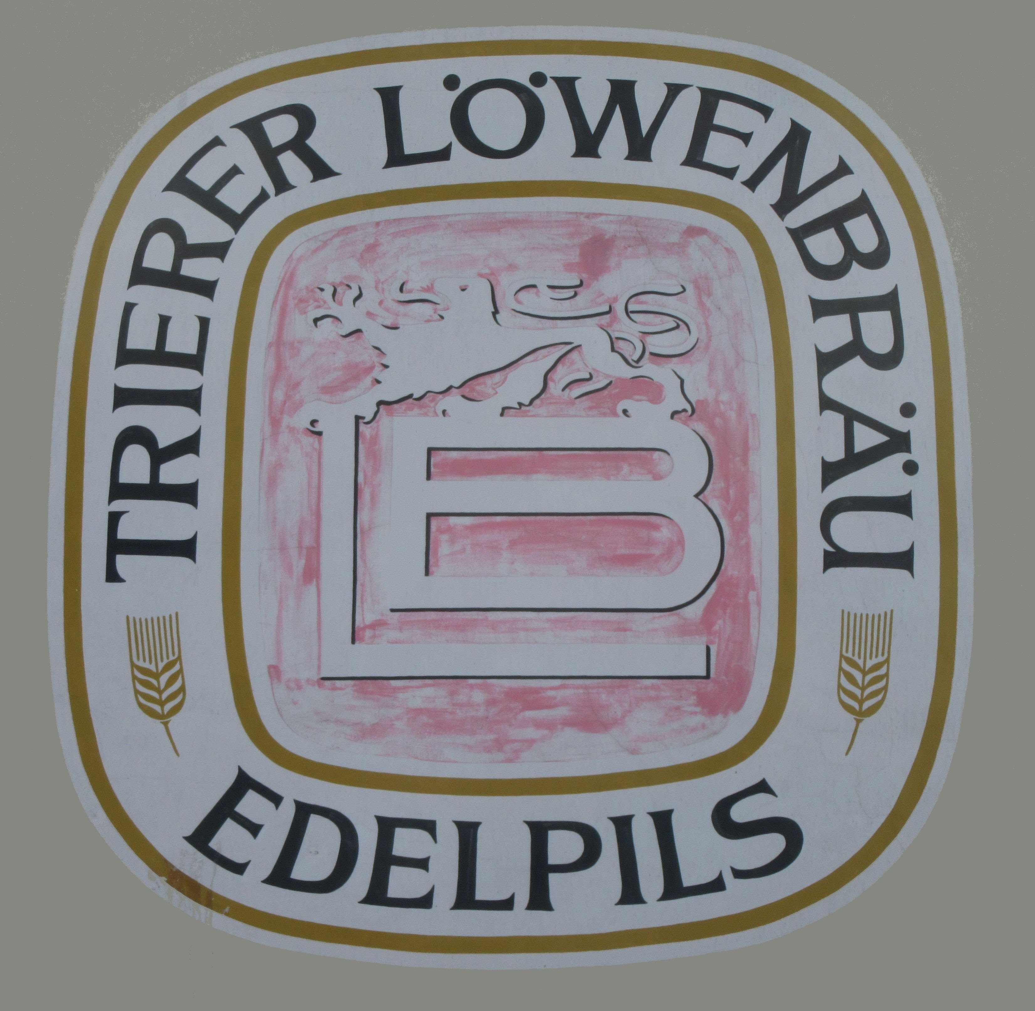 Logo der Löwenbrauerei Trier, gesehen in Konz, 2018